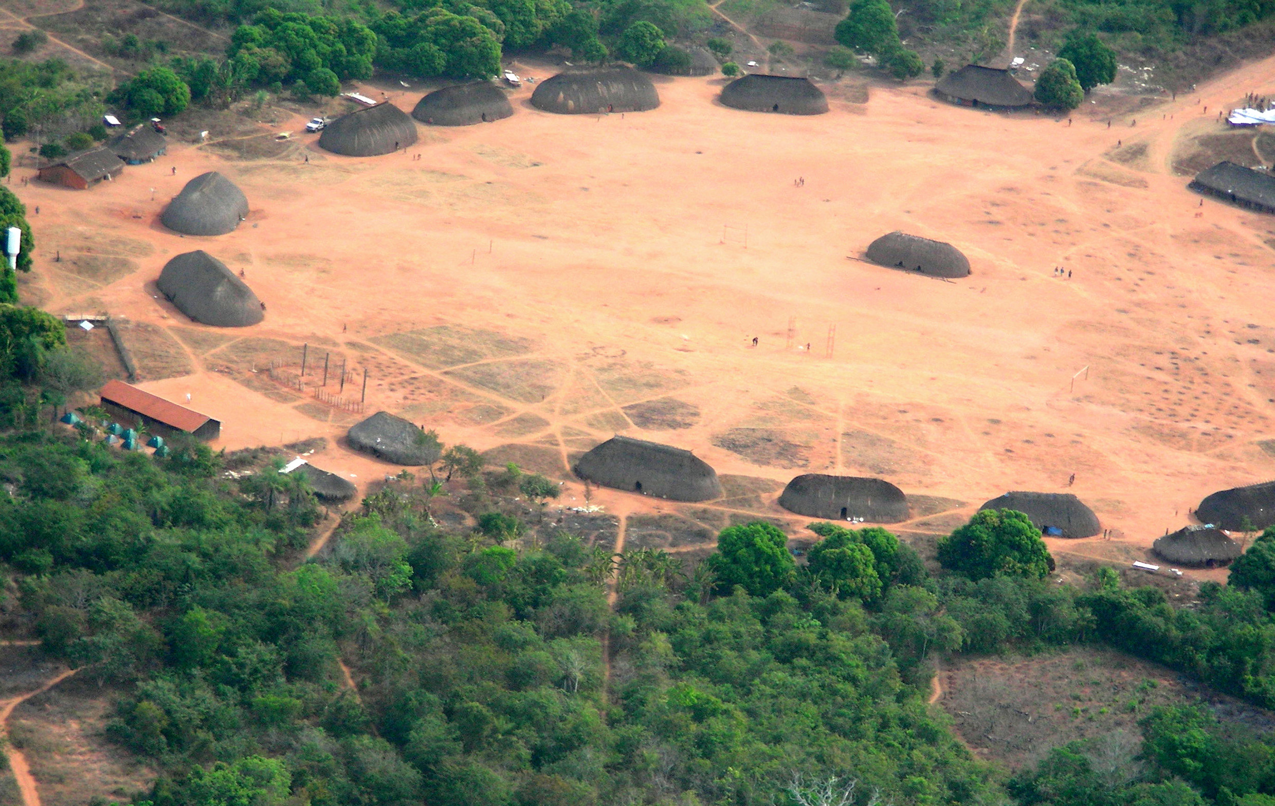 Aldeia Ipatse (Parque Indígena do Xingu) - A principal comunidade dos Kuikuro.